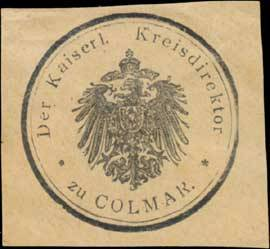 Sealing stamp Title: Der Kaiserl. Kreisdirektor zu Colmar Description: Briefsiegel Place: Colmar/Elsaß size: 4x5 cm